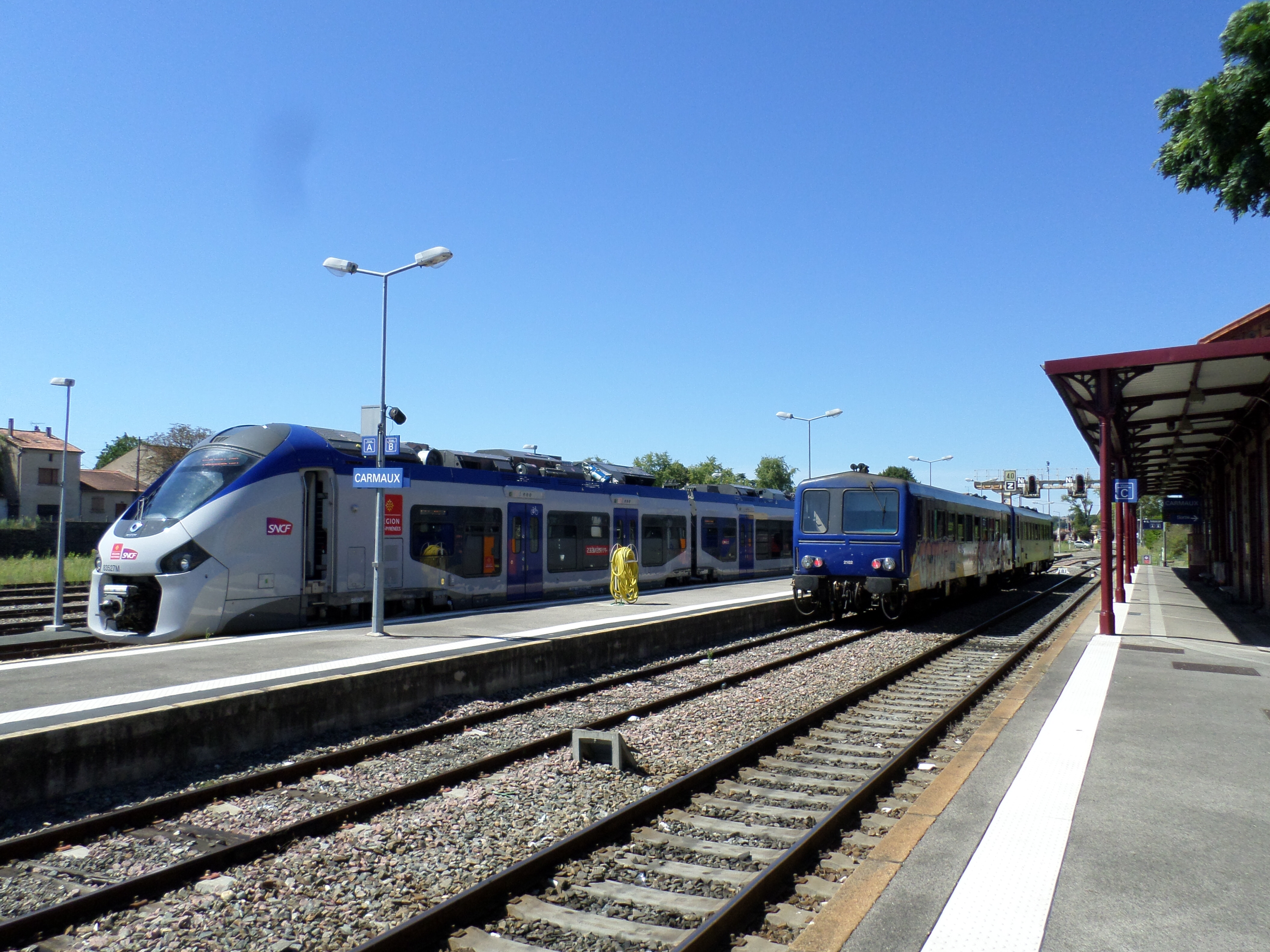 Régiolis (rame B 83527) et X2100 (rame X2102) en gare de Carmaux (81) le 26 août 2015.